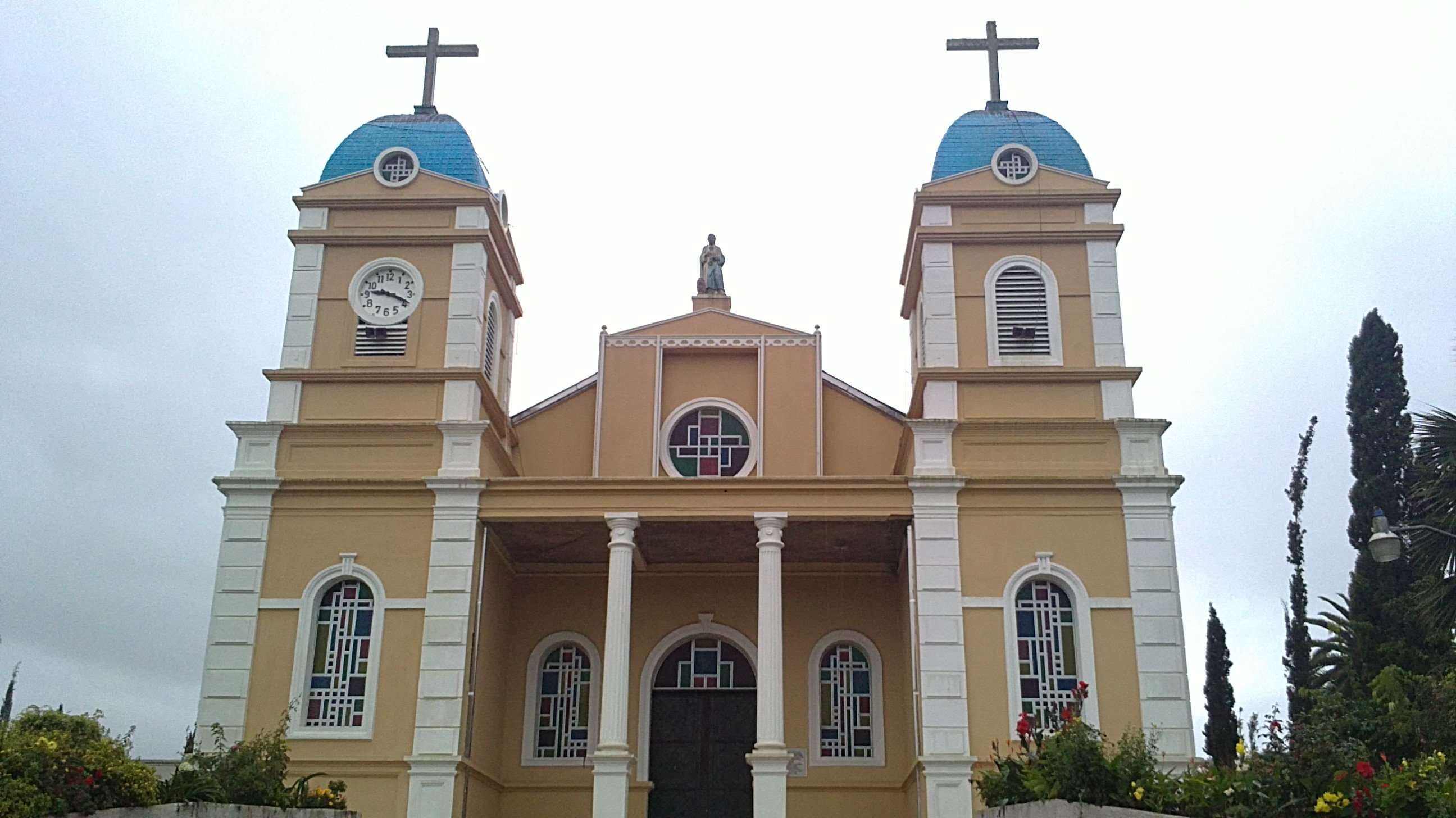 Catedral San Marcos de Tarrazú